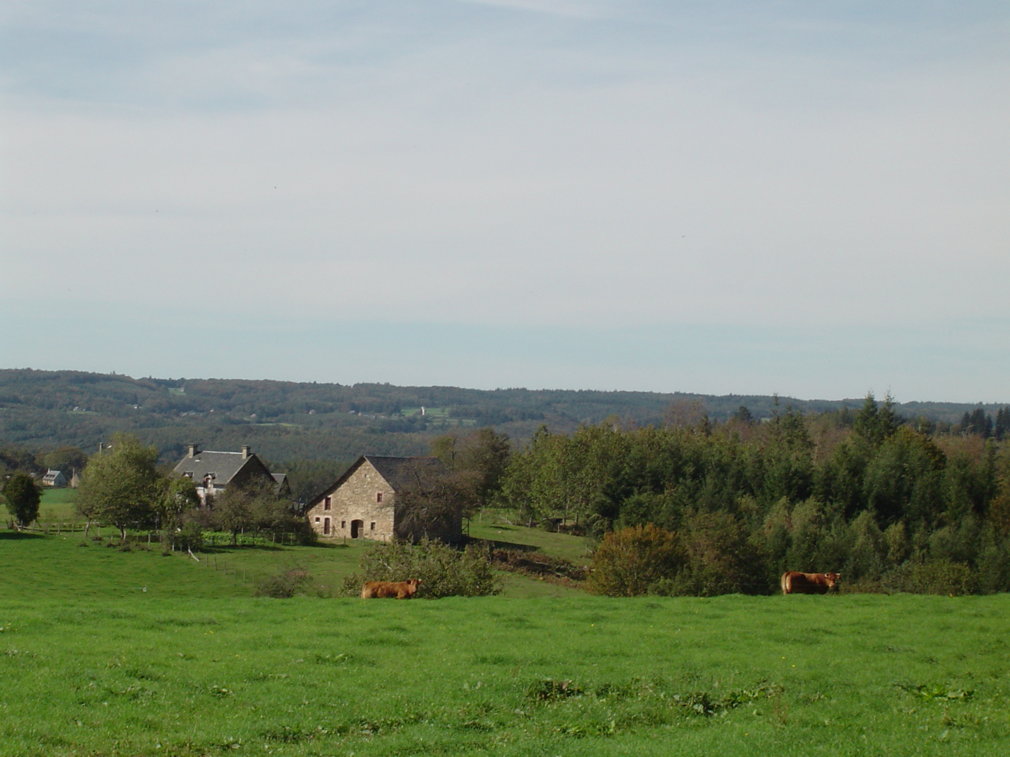 Saint Pantaléon de lapleau, vue du bourg